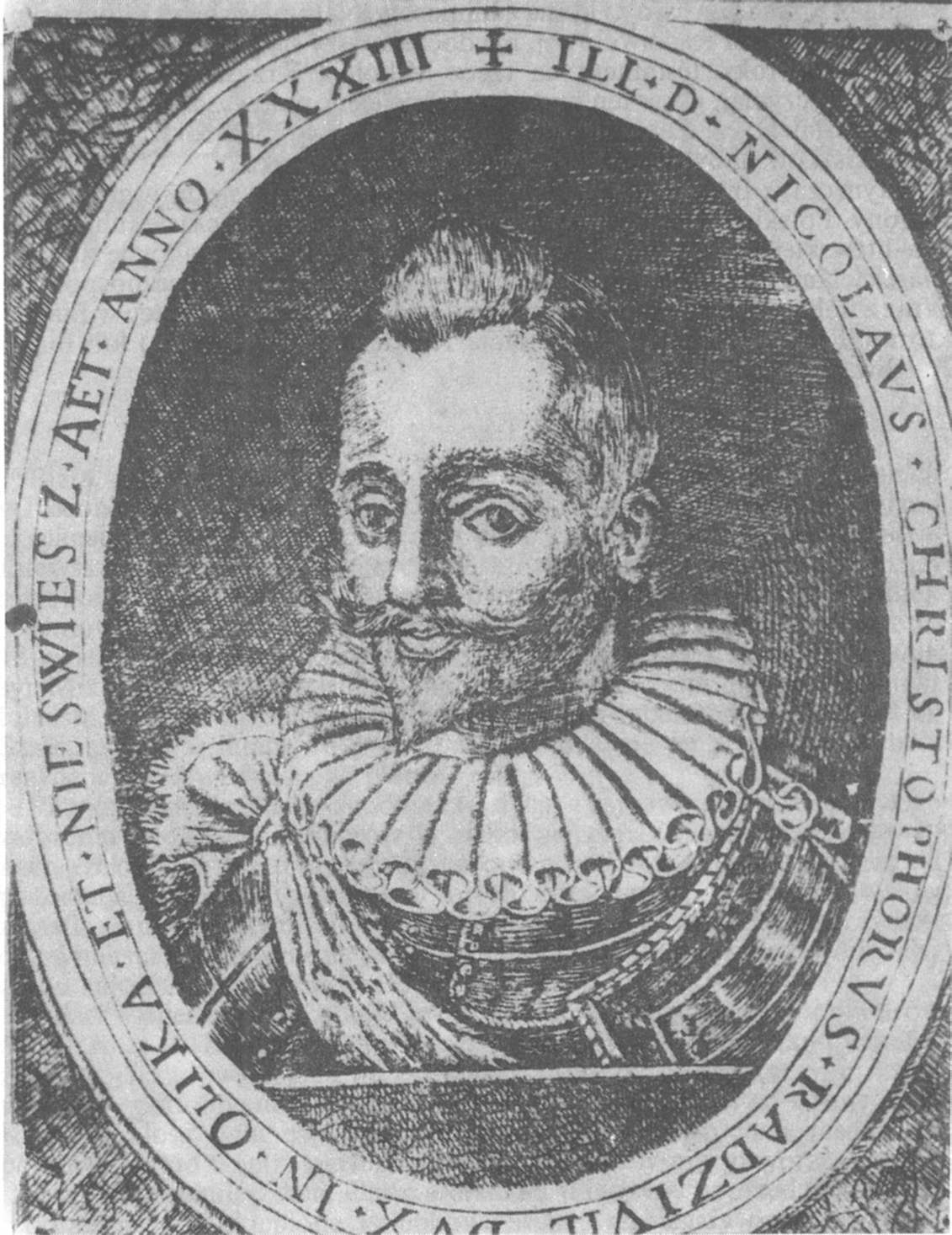 Mikołaj Krzysztof Radziwiłł (Sierotka) 1549-1616, Listy, Warszawa 1962